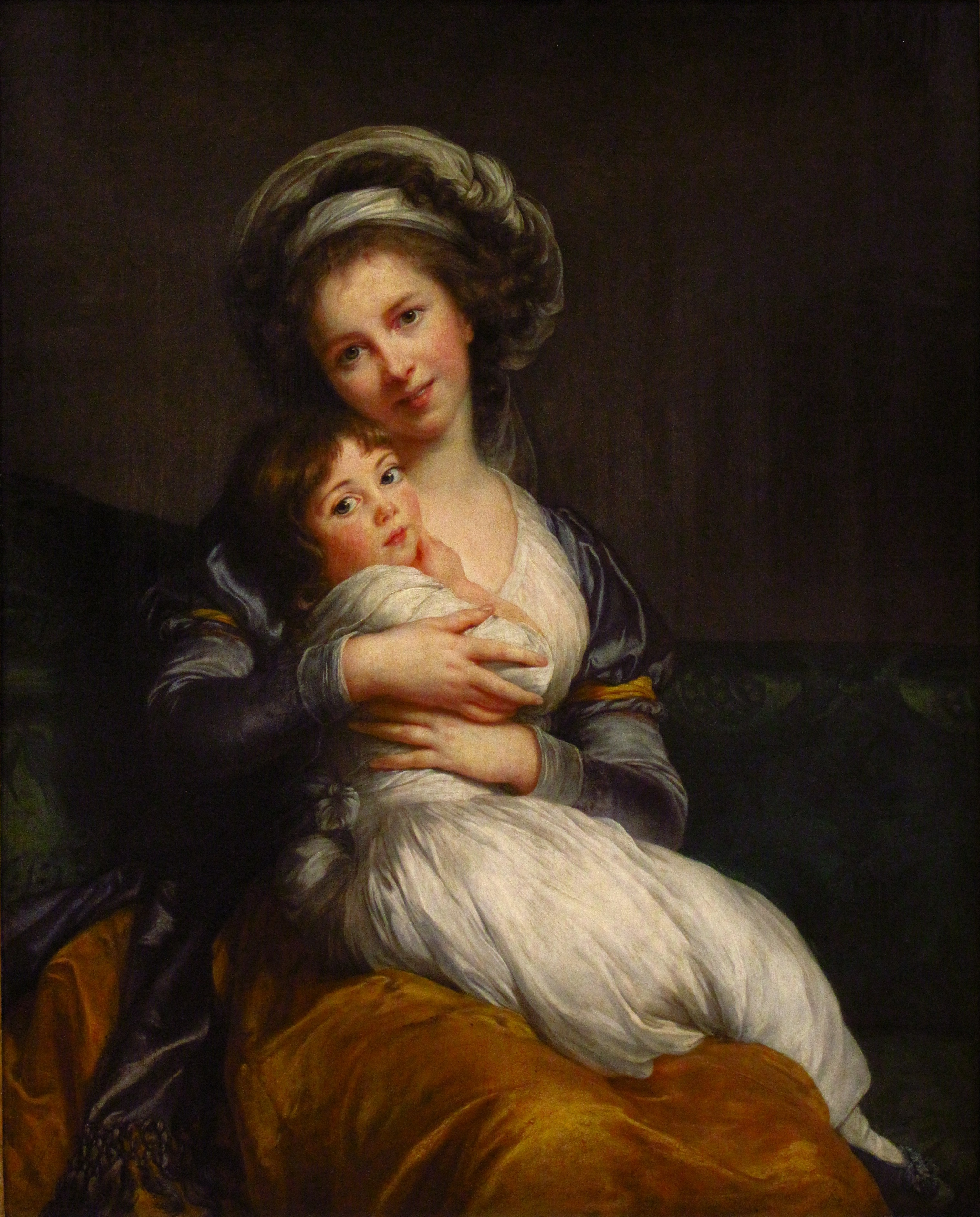 Madame Vigée-Le Brun et sa fille, Jeanne-Lucie, dite Julie (1780 - 1819).